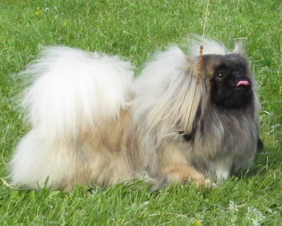 Moletai May 2014